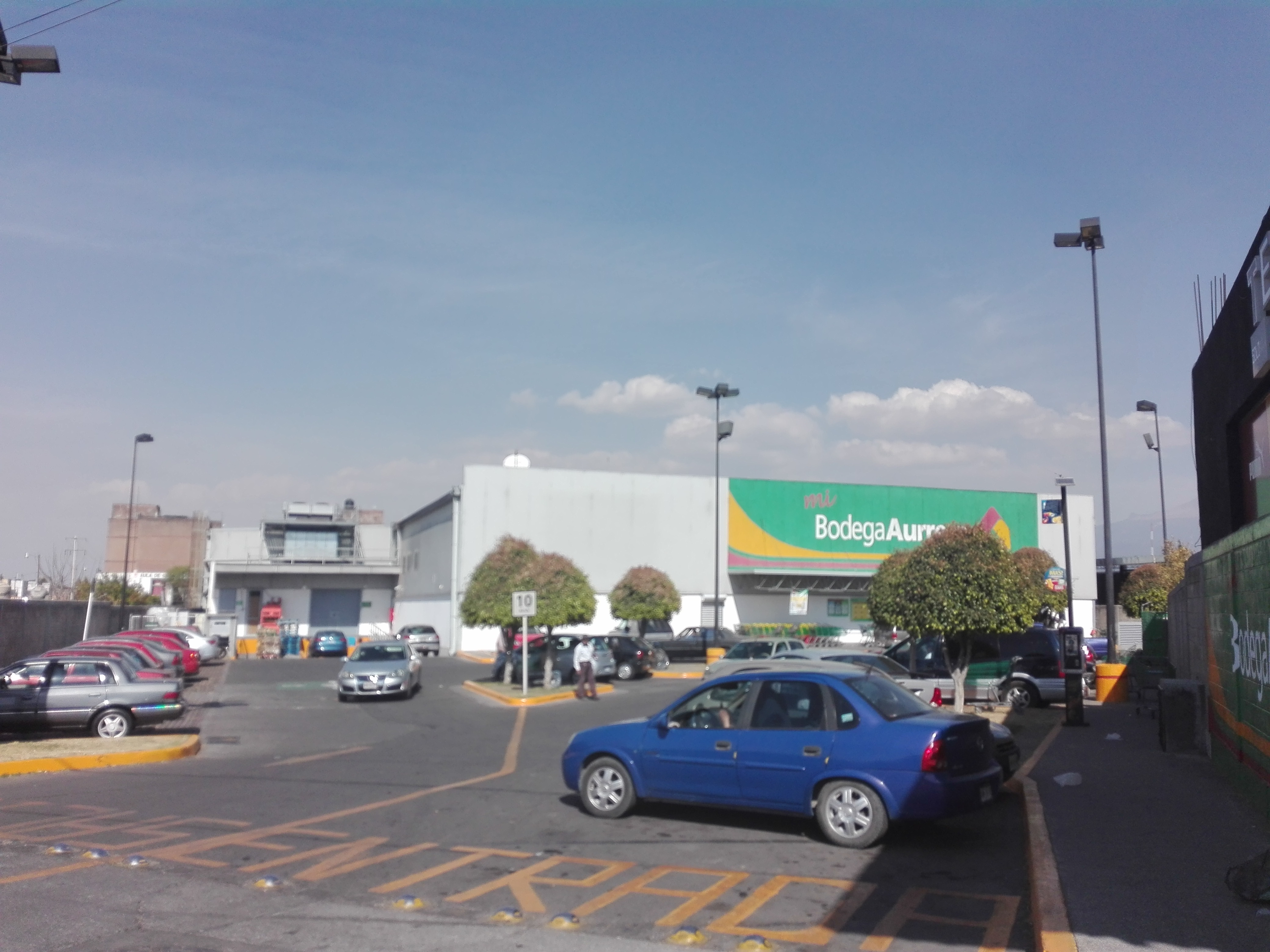 Zona Iturbide, Zacatelco, Tlaxcala